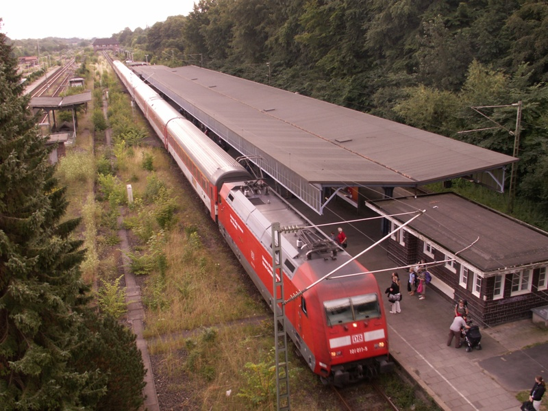 Flensburger Bus- und Bahnverkehr